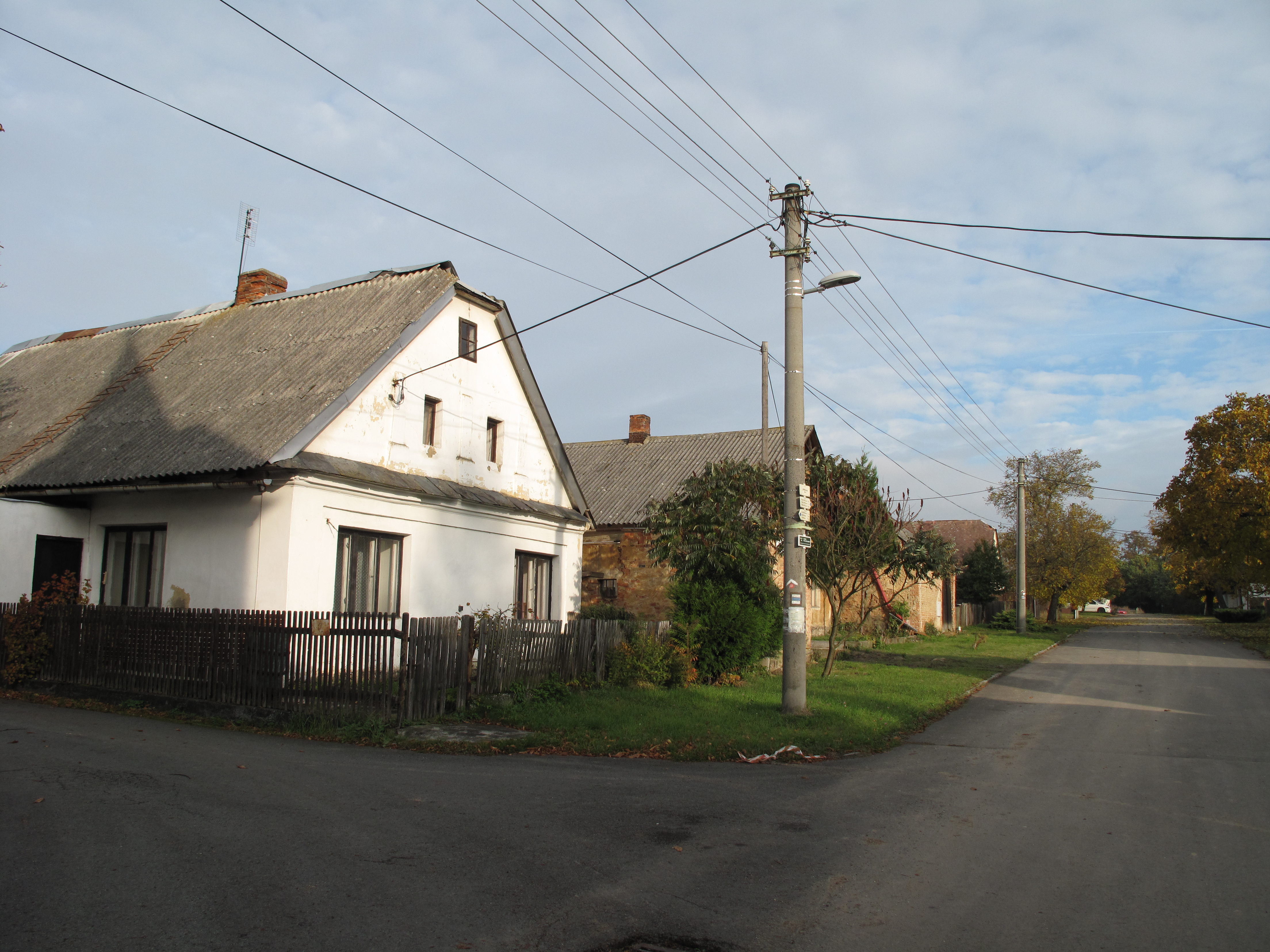 Lipina (Štáblovice). Okres Opava, Česká republika. Če. 2.